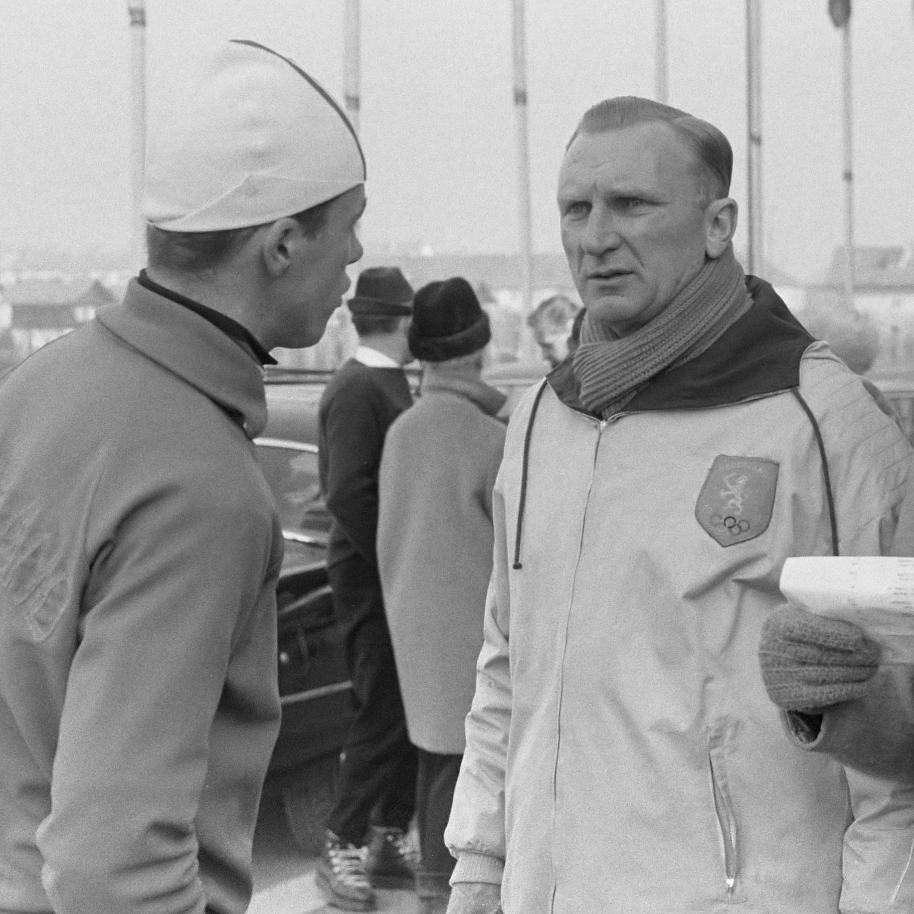 Olympische Winterspelen 1964. Schaatser Rudi Liebrechts, chef de mission Kees Kerdel en schaatster Wil de Beer. 31 januari 1964